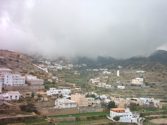 ال طلحة